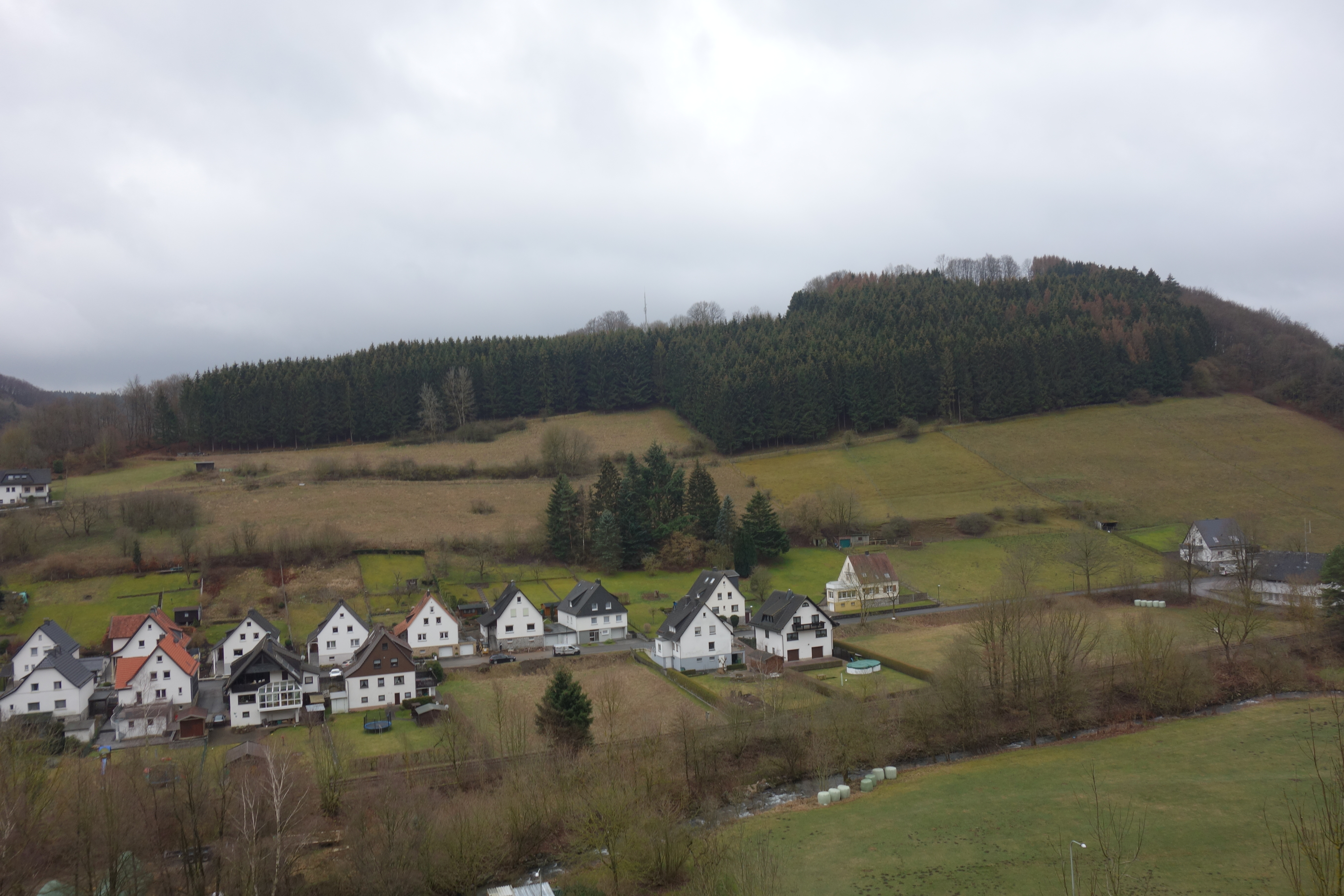 Grünland am Hang gehört zur Nordfläche vom Naturschutzgebiet An der Burg.